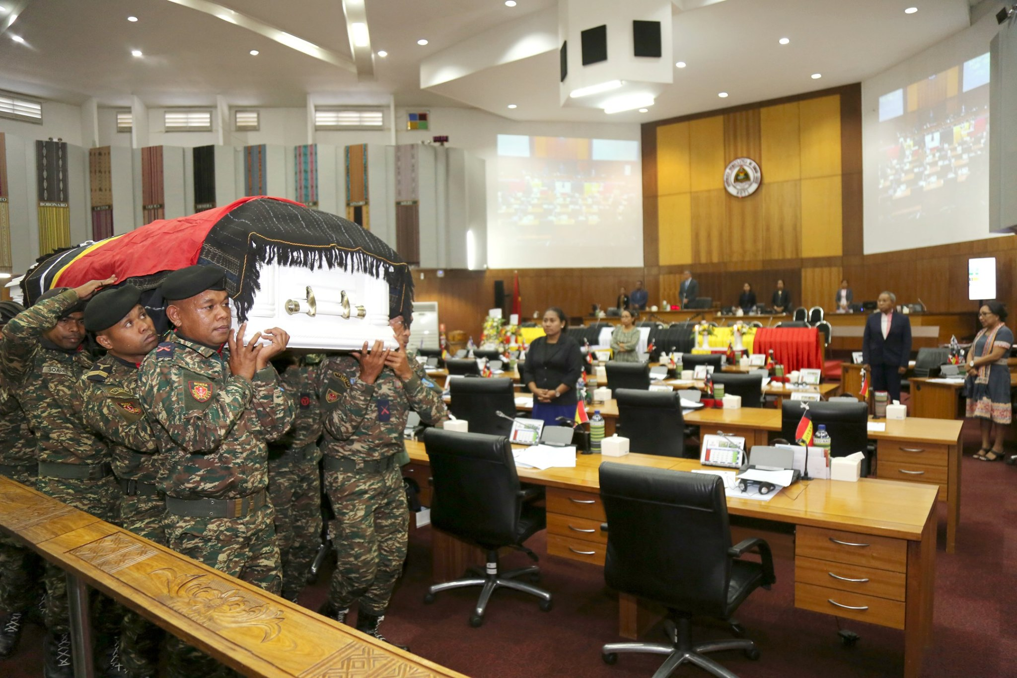 Trauerfeierlichkeit für Lucas da Costa im Nationalparlament Osttimors